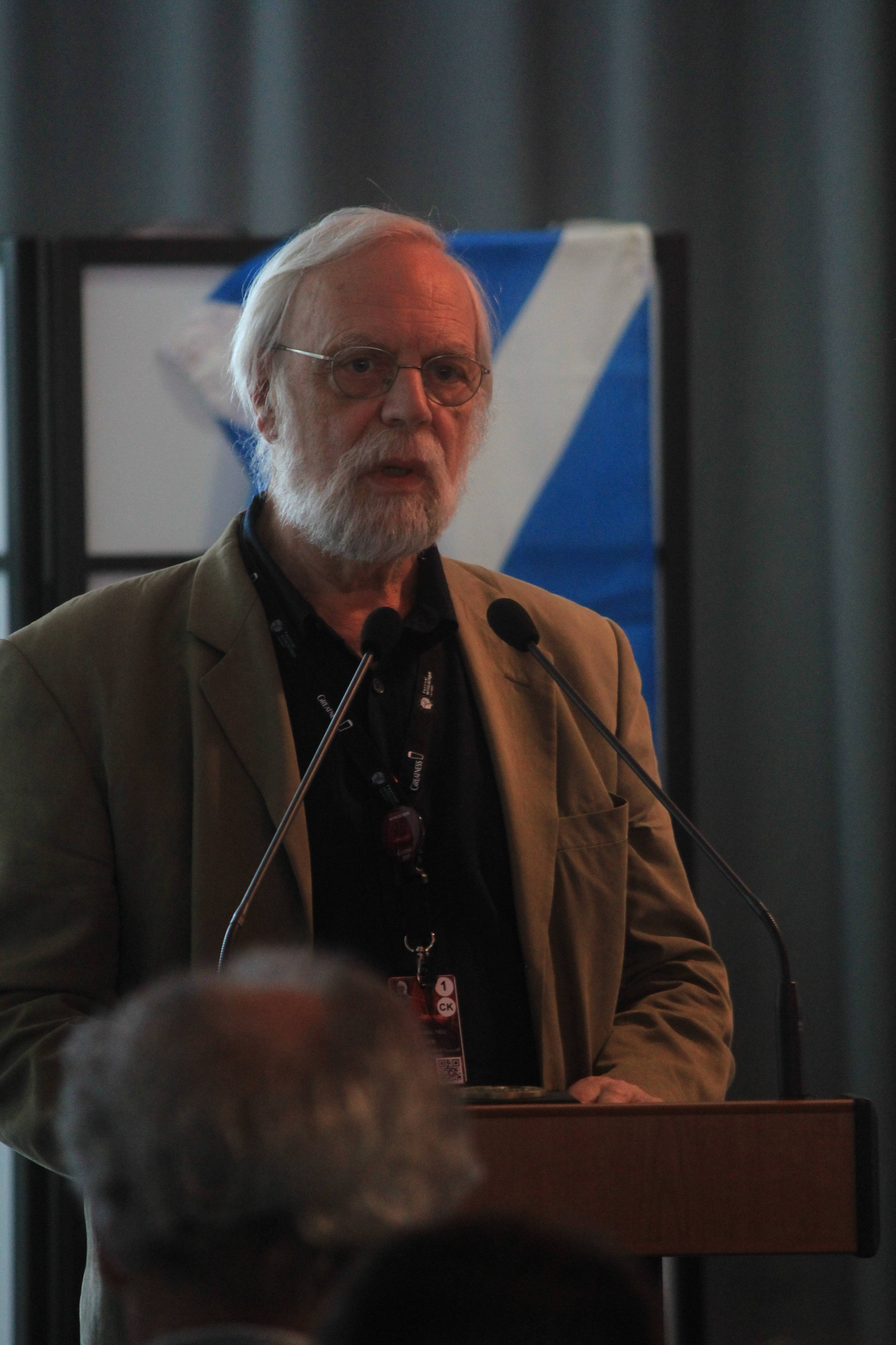 Conférence d'Alex Salmond lors du festival interceltique de Lorient 2017. Patrick Malrieu